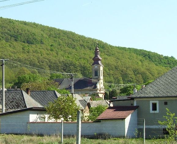 Az alsórakoncai római katolikus templom északnyugat felől fotózva, Szlovákia